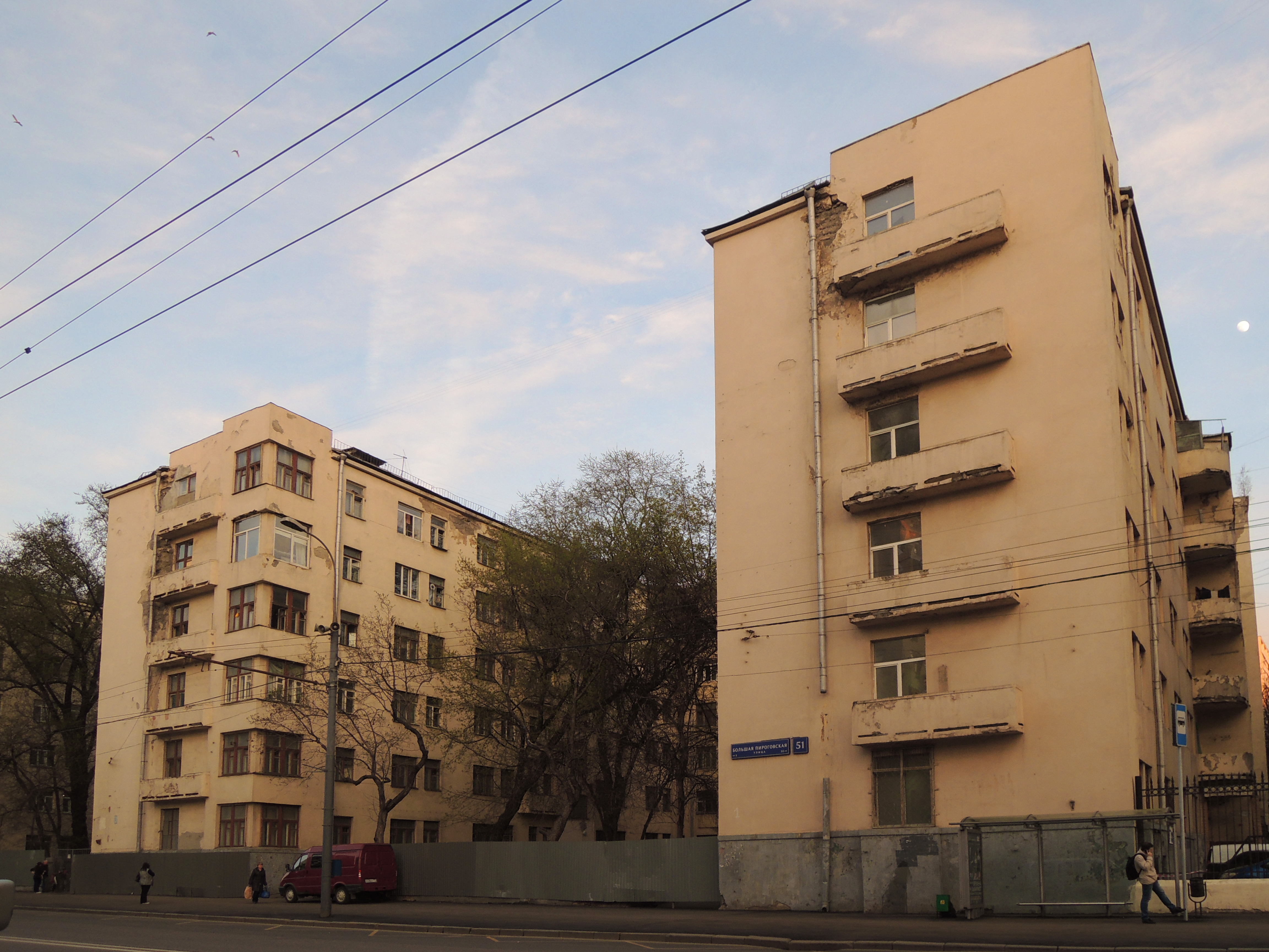 Комплекс общежитий Института красной профессуры строился в 1925-1928 гг. по проекту архитекторов Д.П. Осипова и А.М. Рухлядева. Дом-коммуна (Общежитие) состоит из 8 корпусов, расположенных в шахматном порядке и соединенных общим корпусом с галереями. Благодаря этому между зданиями получились уютные дворики. Здания украшают угловые окна, полукруглые выступы, скругленные балконы, ряды «косых» окон лестничных клеток. Секционная планировка обусловлена разнообразным режимом использования жилых помещений — как квартиры для постоянного проживания и как общежитие.